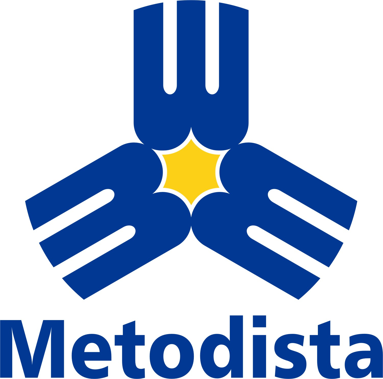 Universidade Metodista de São Paulo